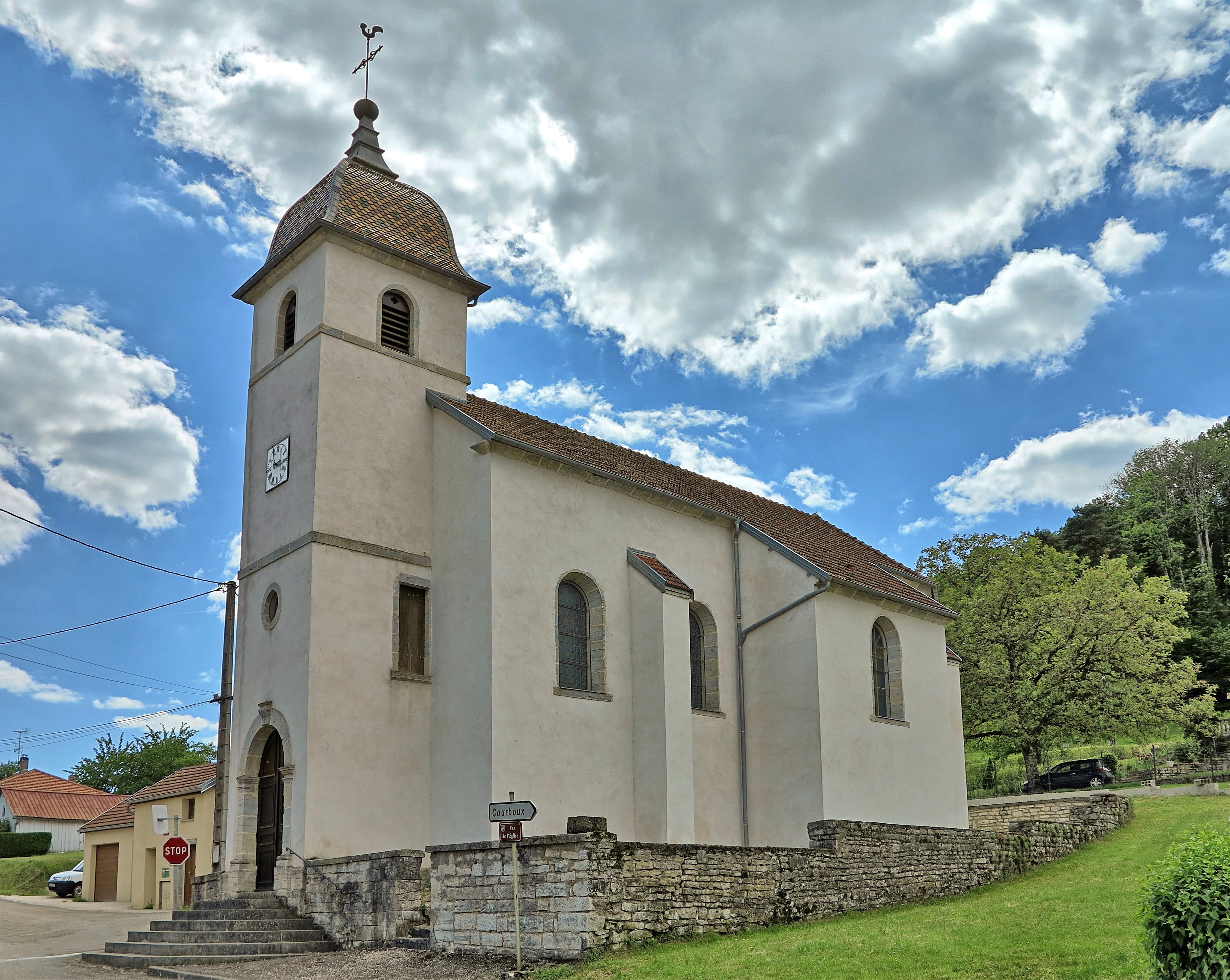 L'église de Pennesières